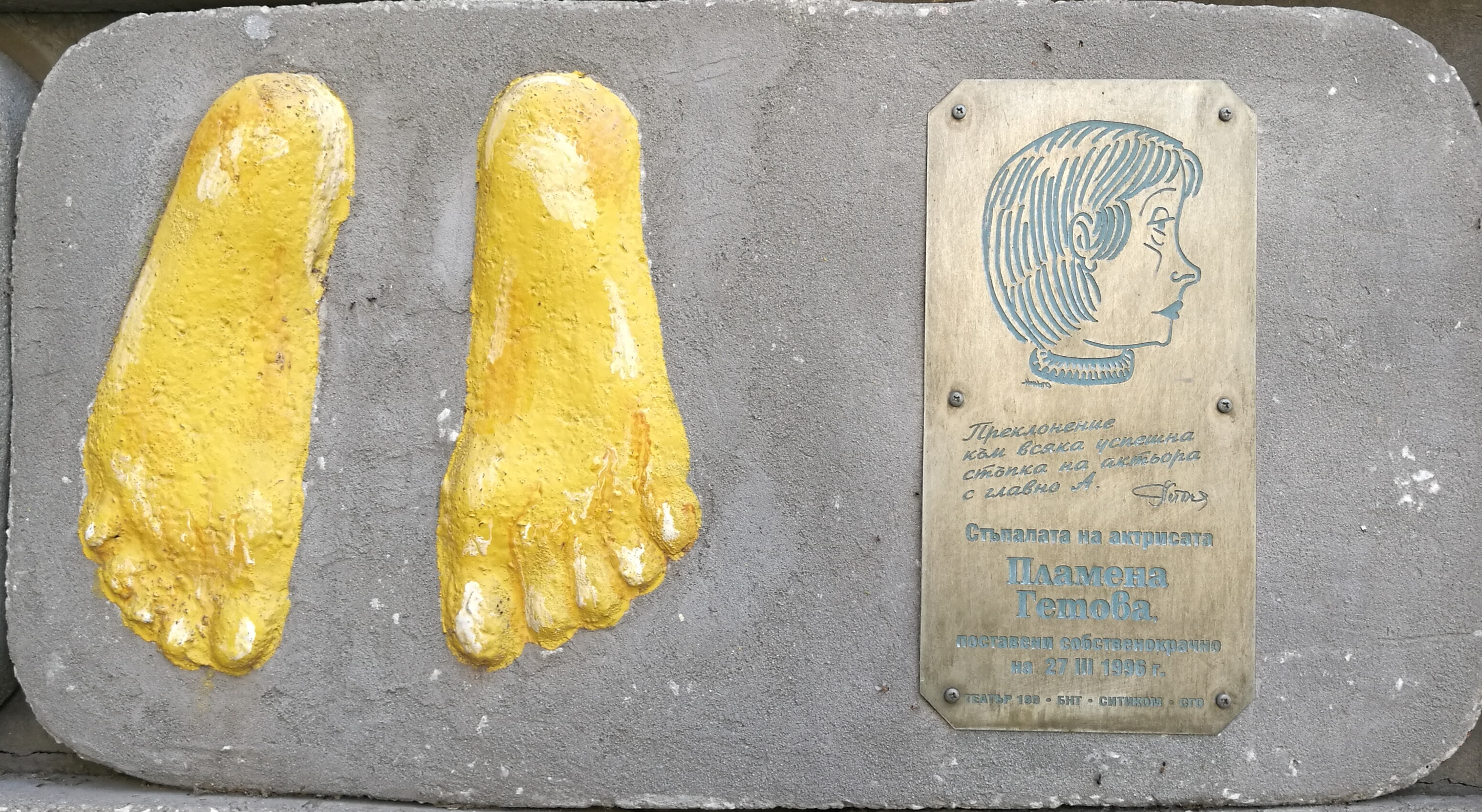 Стената на славата пред Театър 199 - пано с отпечатъци, послание и шарж на Пламена Гетова.